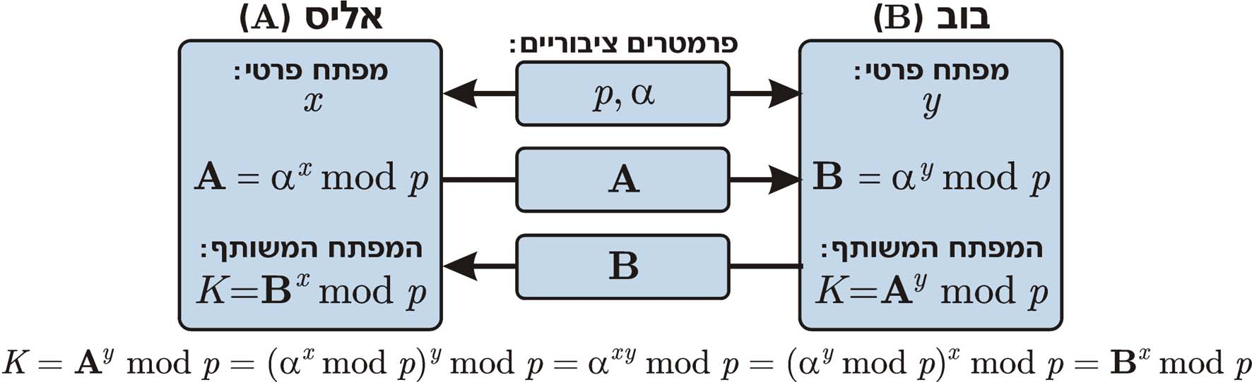 פרוטוקול דיפי-הלמן הבסיסי לשיתוף מפתח הצפנה.